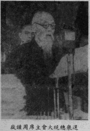 第一屆國民大會專輯圖片